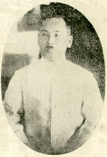 Bân-lâm-gú: 太田吾一 (Ōta Goichi), Ji̍t-pún koaⁿ-liâu